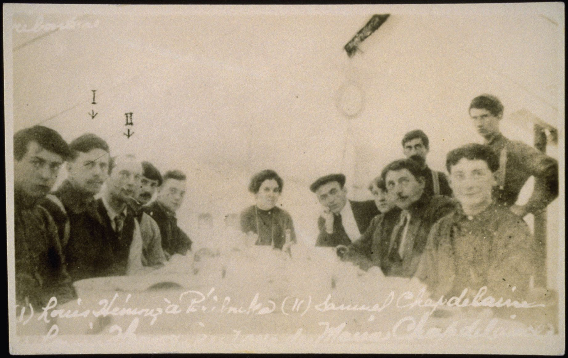 Louis Hémon à Péribonka